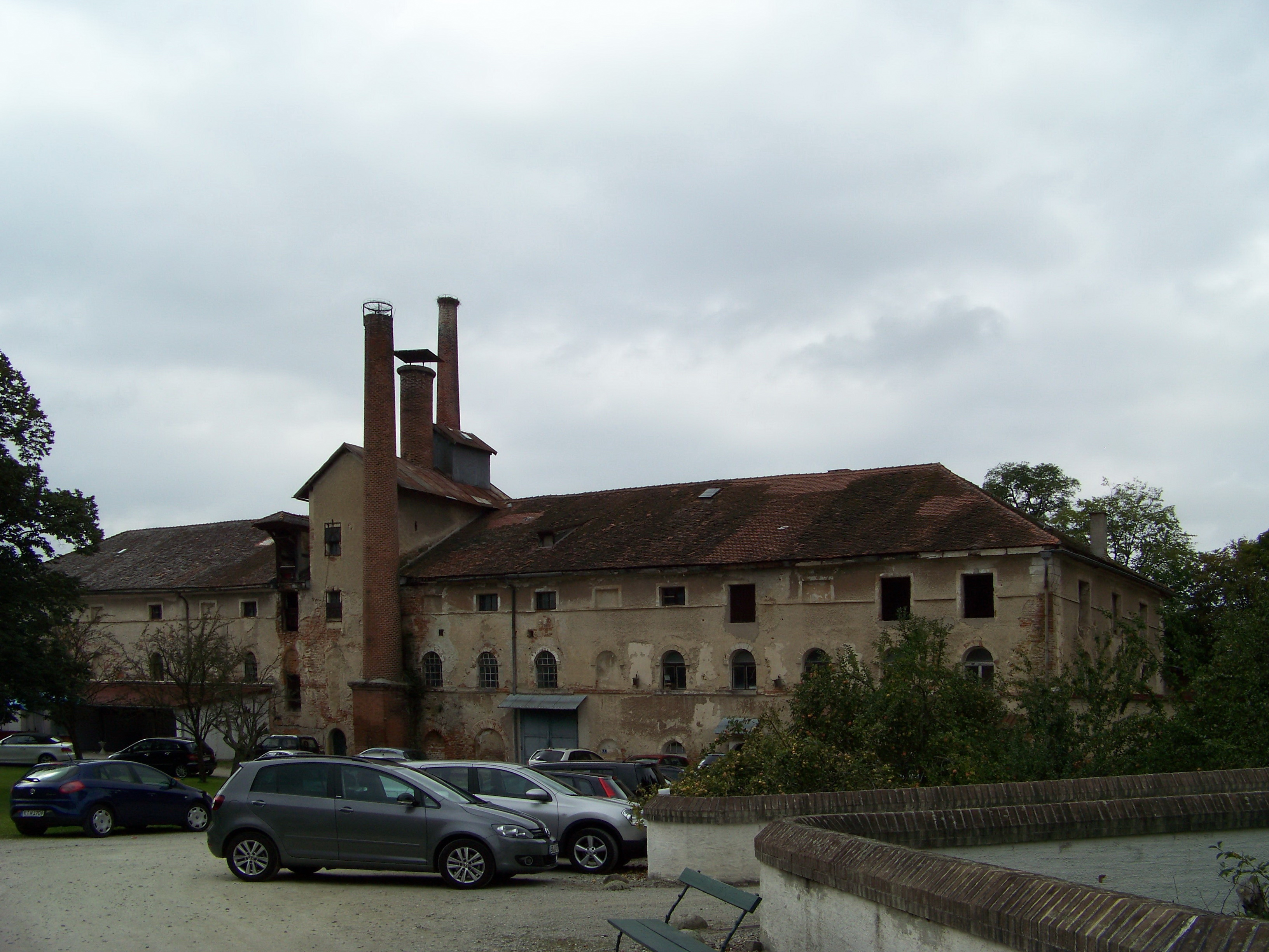 Sünching, Am Schloss 2, Schlossökonomie, eingeschossige Dreiflügelanlage mit Walmdächern, zweigeschossigen Pavillons als Kopfbauten, Dachreiter und Hoftoren, Mitte 18.